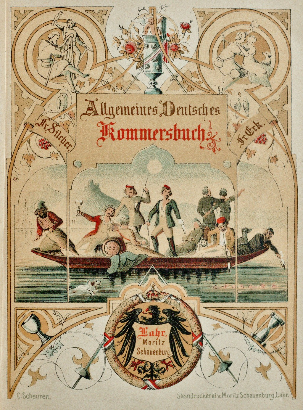 Titelbild des Allgemeinen Deutschen Commersbuches 55.-58. Auflage (ca. 1897)